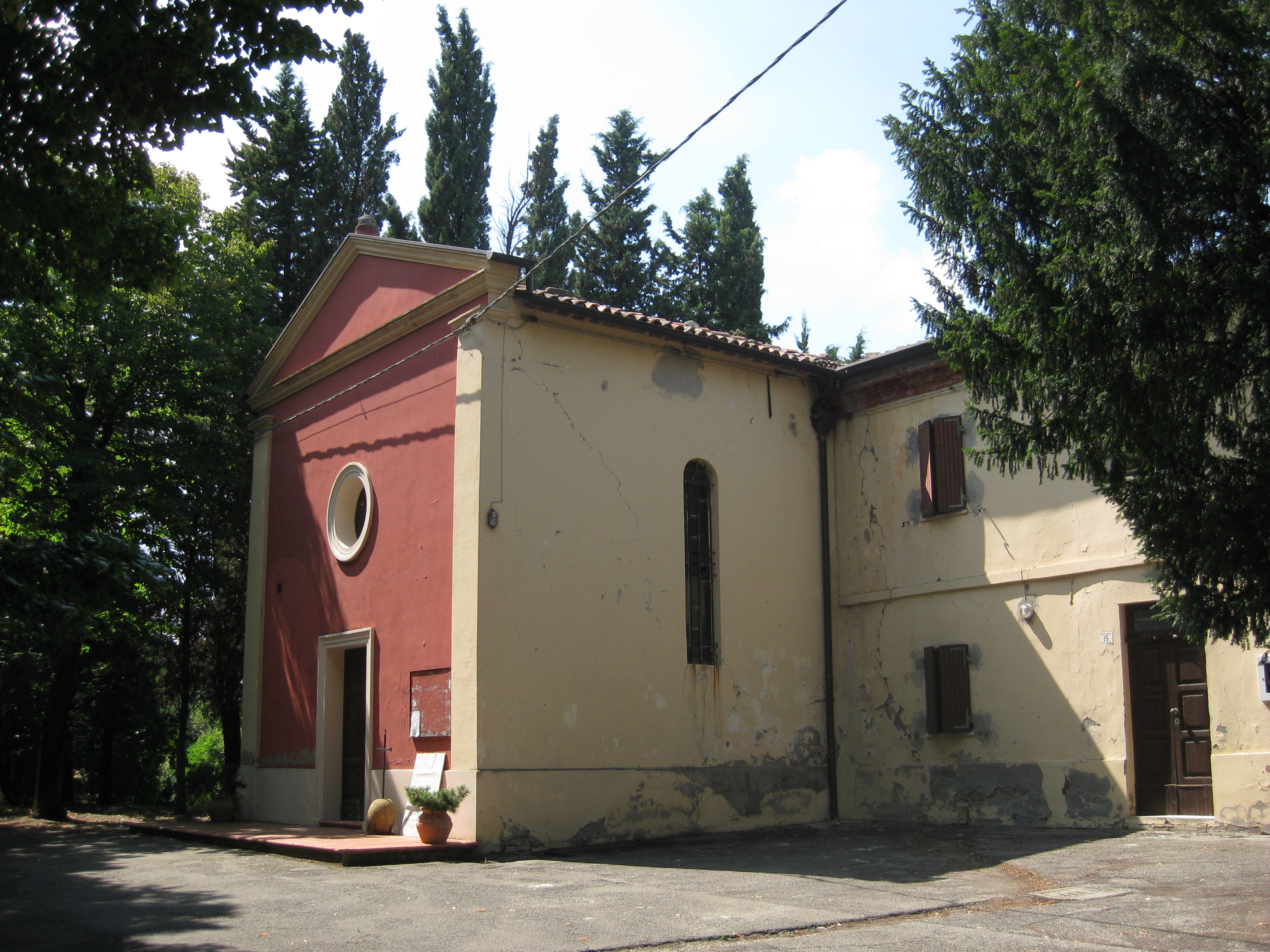 Chiesa di Ravaldino in Monte, foto propria